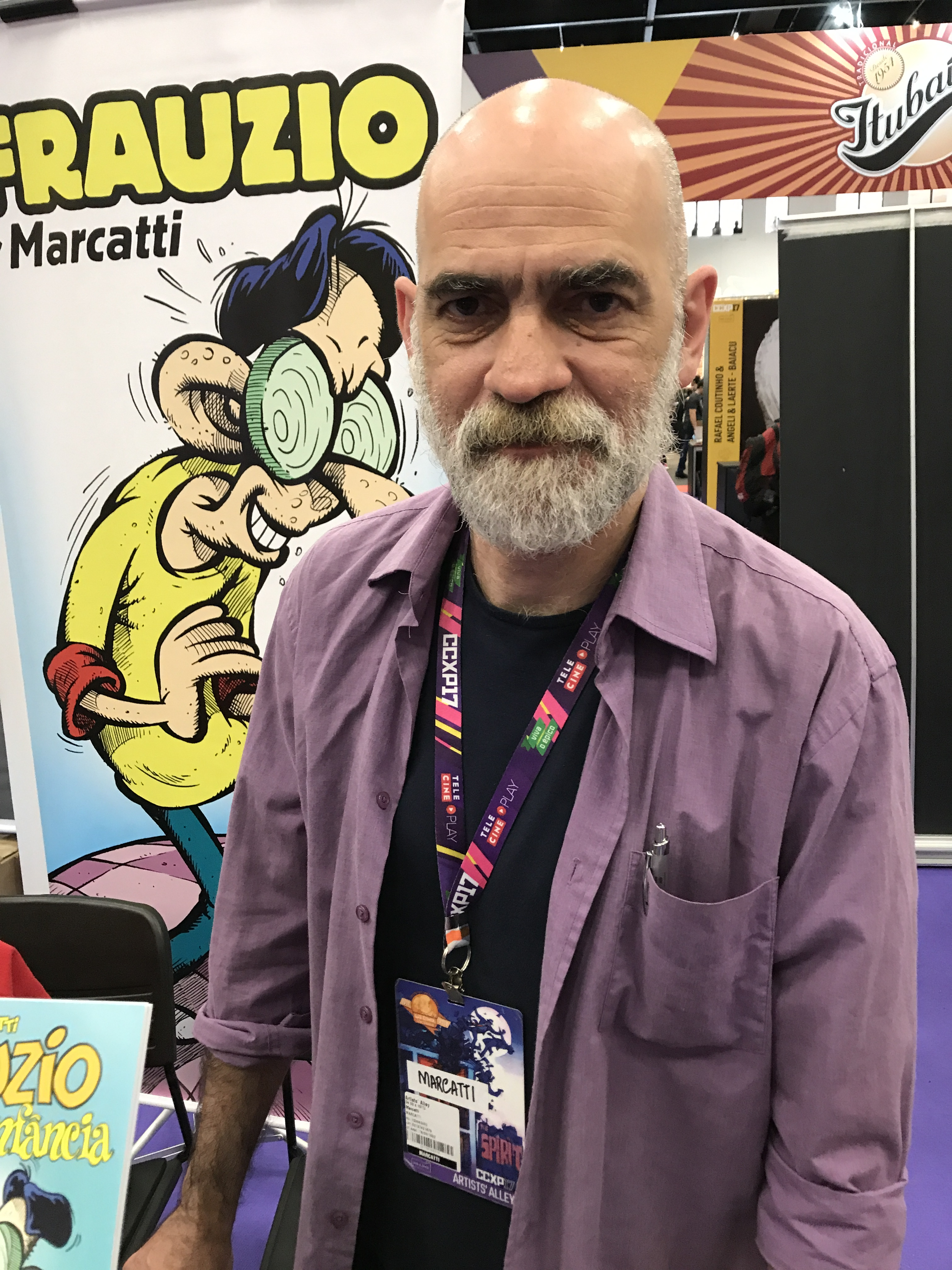 Artista Marcatti na edição de 2017 da Comic Con Experience